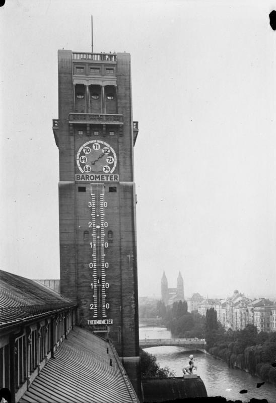 Das grösste Thermometer Deutschlands ! Das grösste Thermometer Deutschlands befindet sich am Turm des Deutschen Museums in München. Das Thermometer hat eine Höhe von 22 m und ist weithin sichtbar.